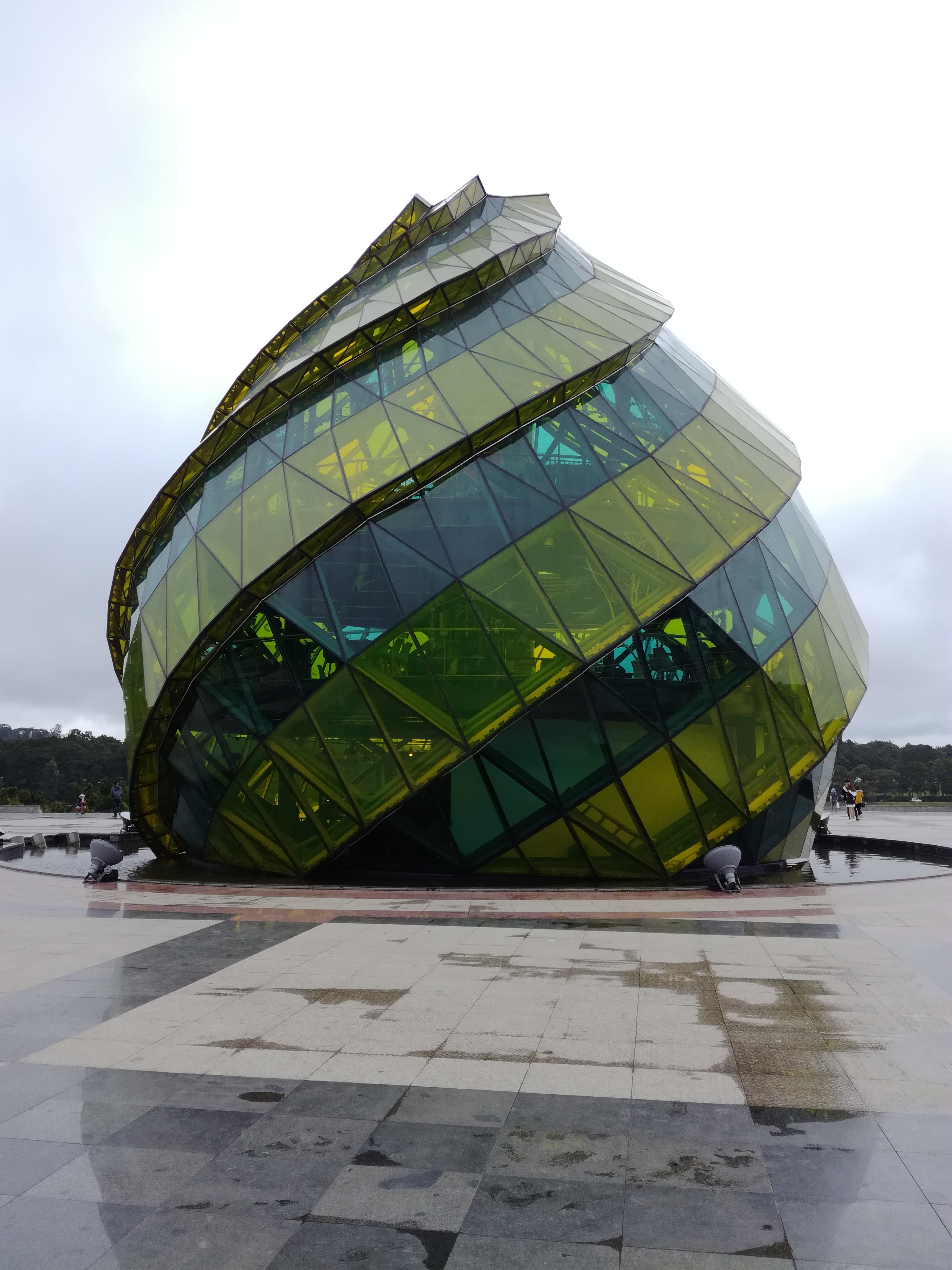 Lâm Viên square (August 7, 2018) (43968583912).jpg